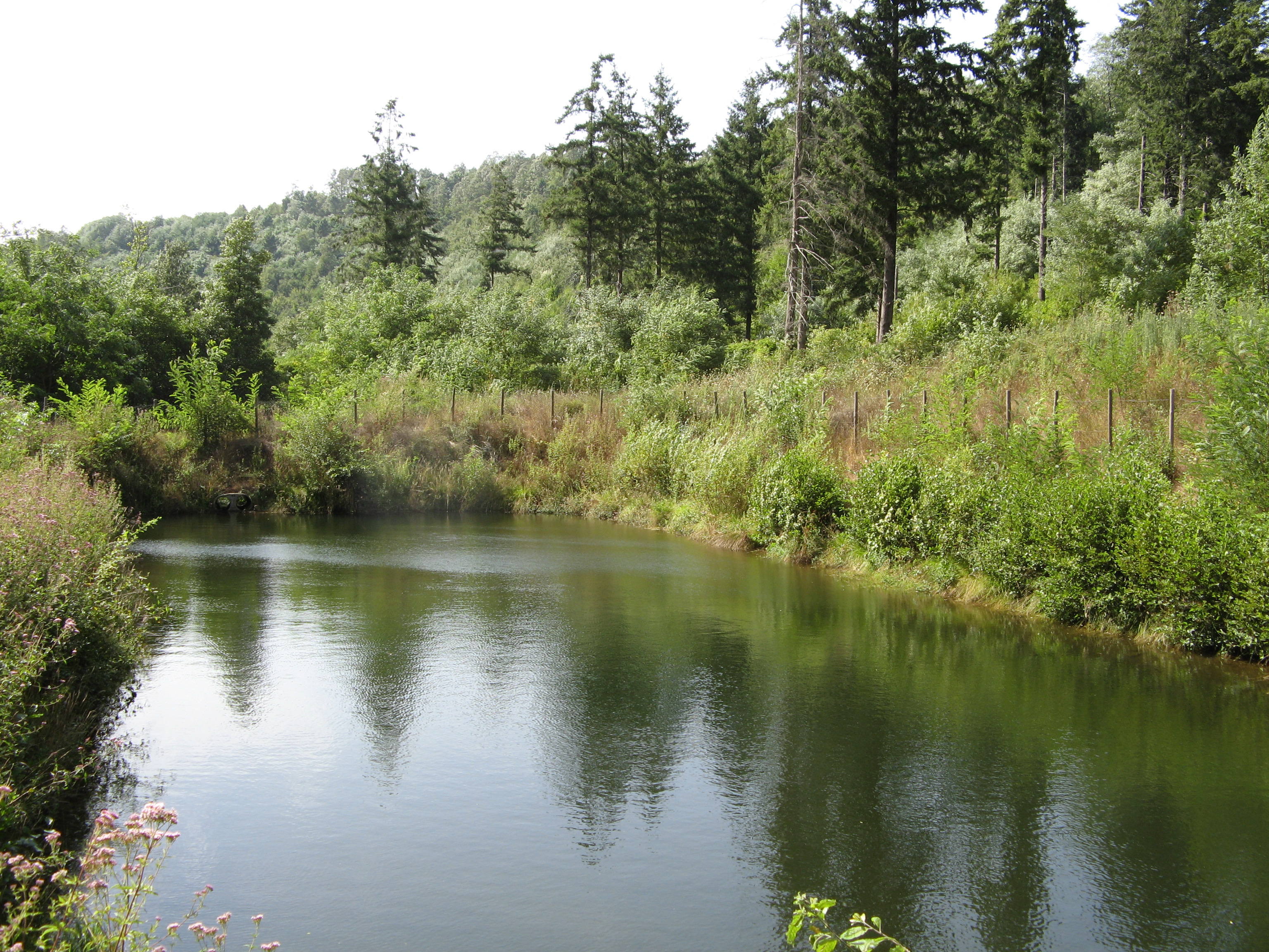 Adami, Stagno in località Ferrata